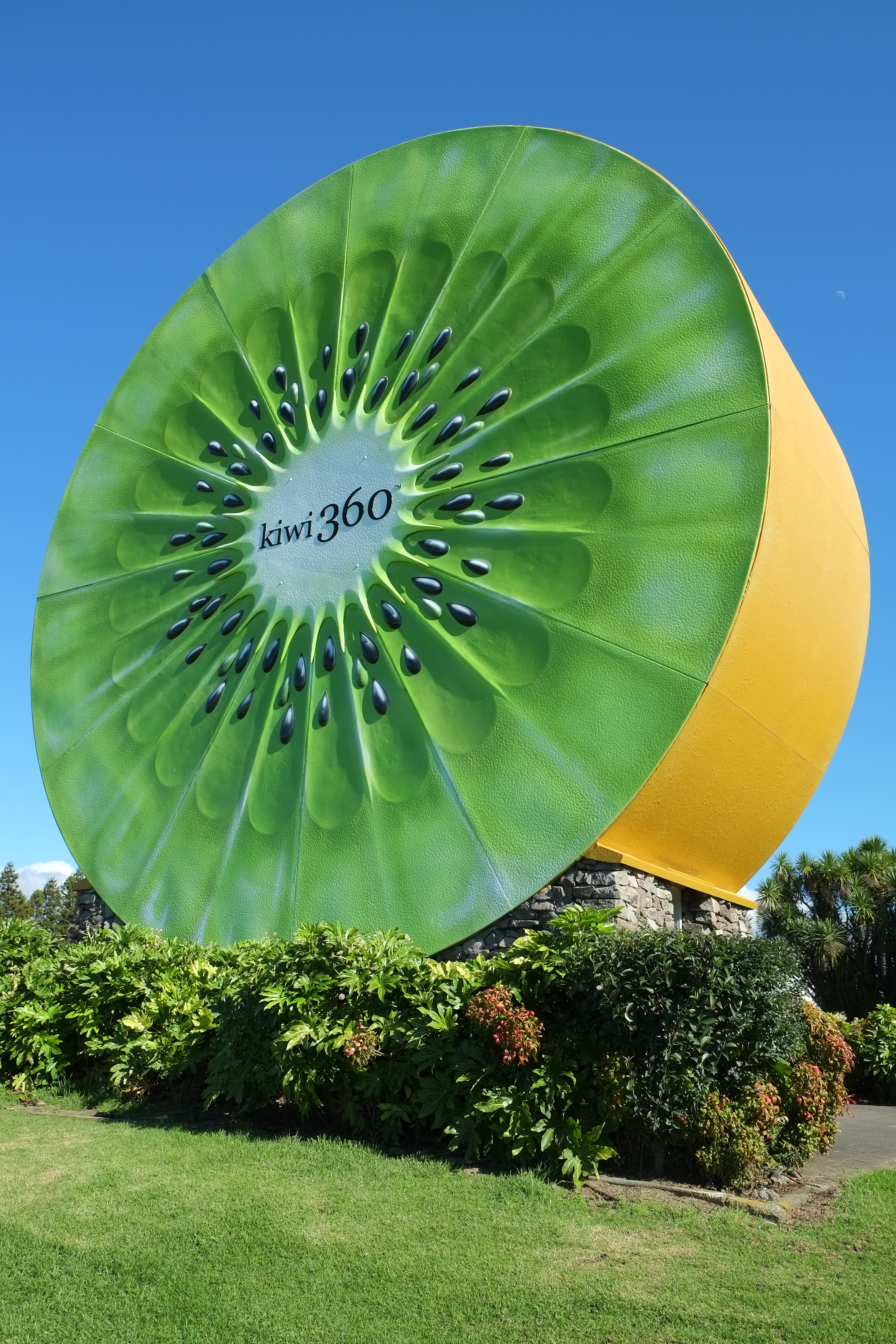 Giant kiwifruit at Te Puke Kiwi 360 - green side